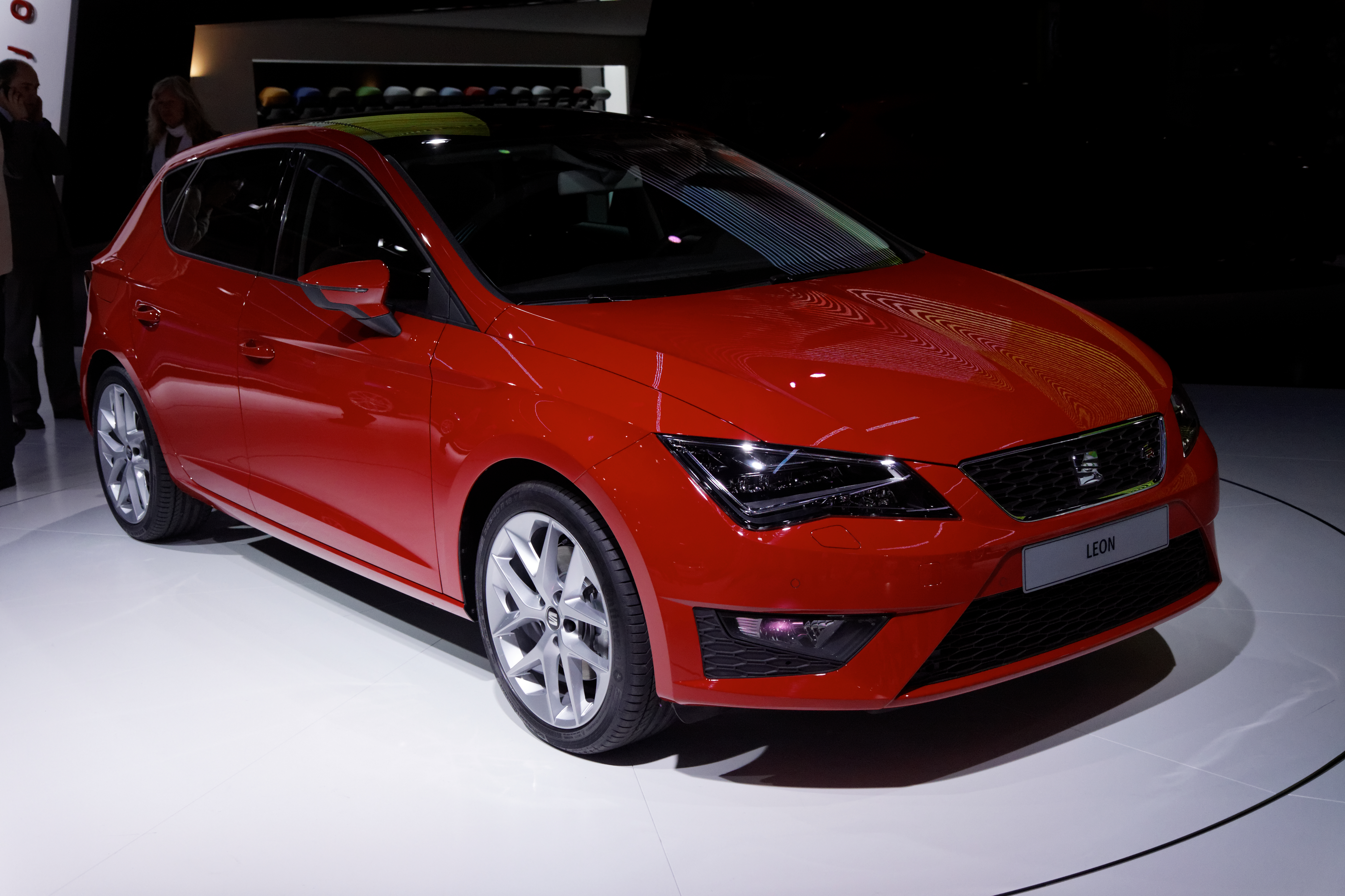 Une Seat Leon présentée lors du Mondial de l'Automobile de Paris 2012.